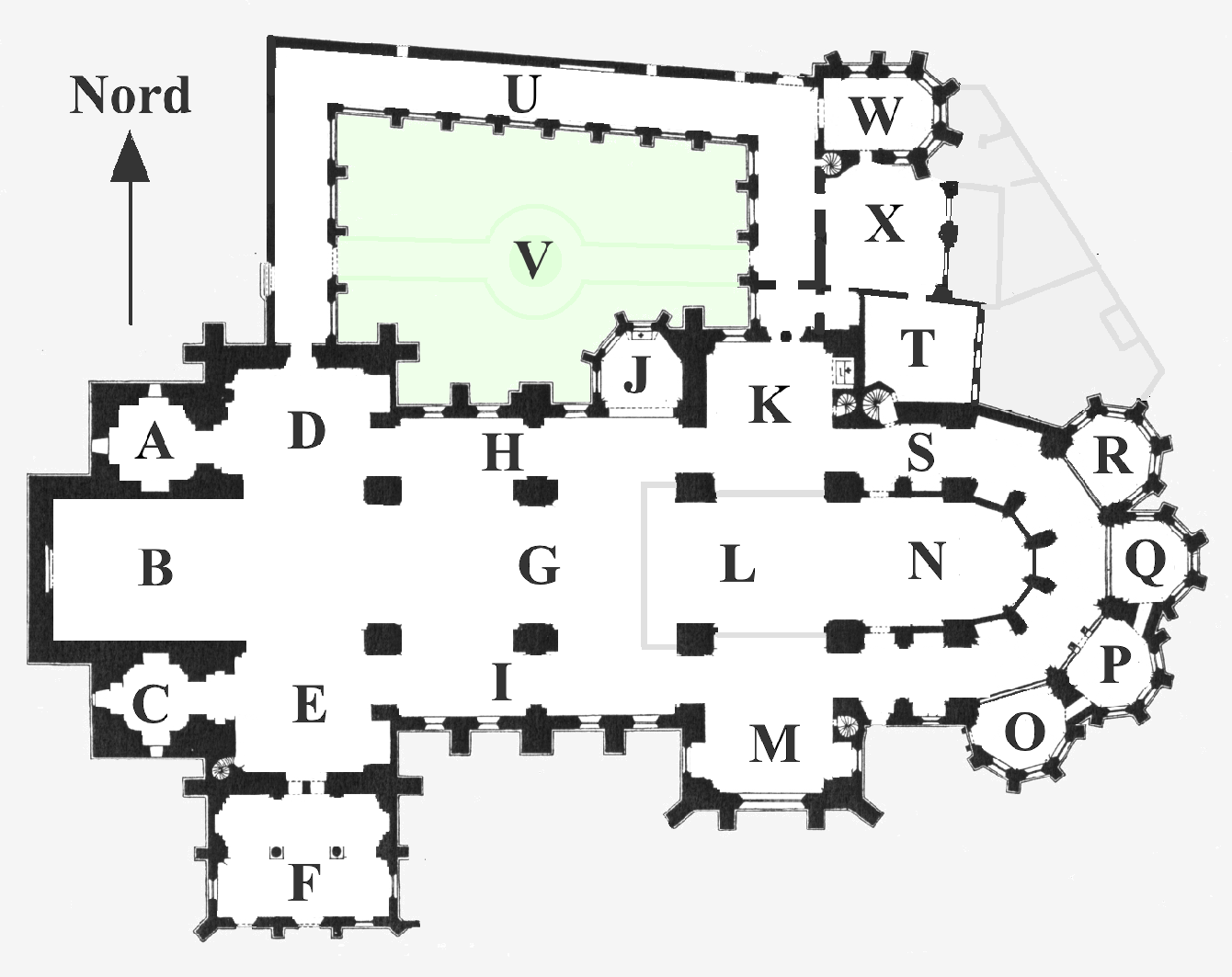 Grundriss des Paulus-Domes in Münster, basierend auf Grundriss-Skizze auf der Seite des Paulus-Domes, mit Veränderungen und Anpassungen an die heutige Situation.